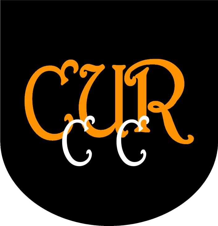 Emblem of defunct Uruguayan Central Uruguay Railway Cricket Club (CURCC), predecessor or Club A. Peñarol.